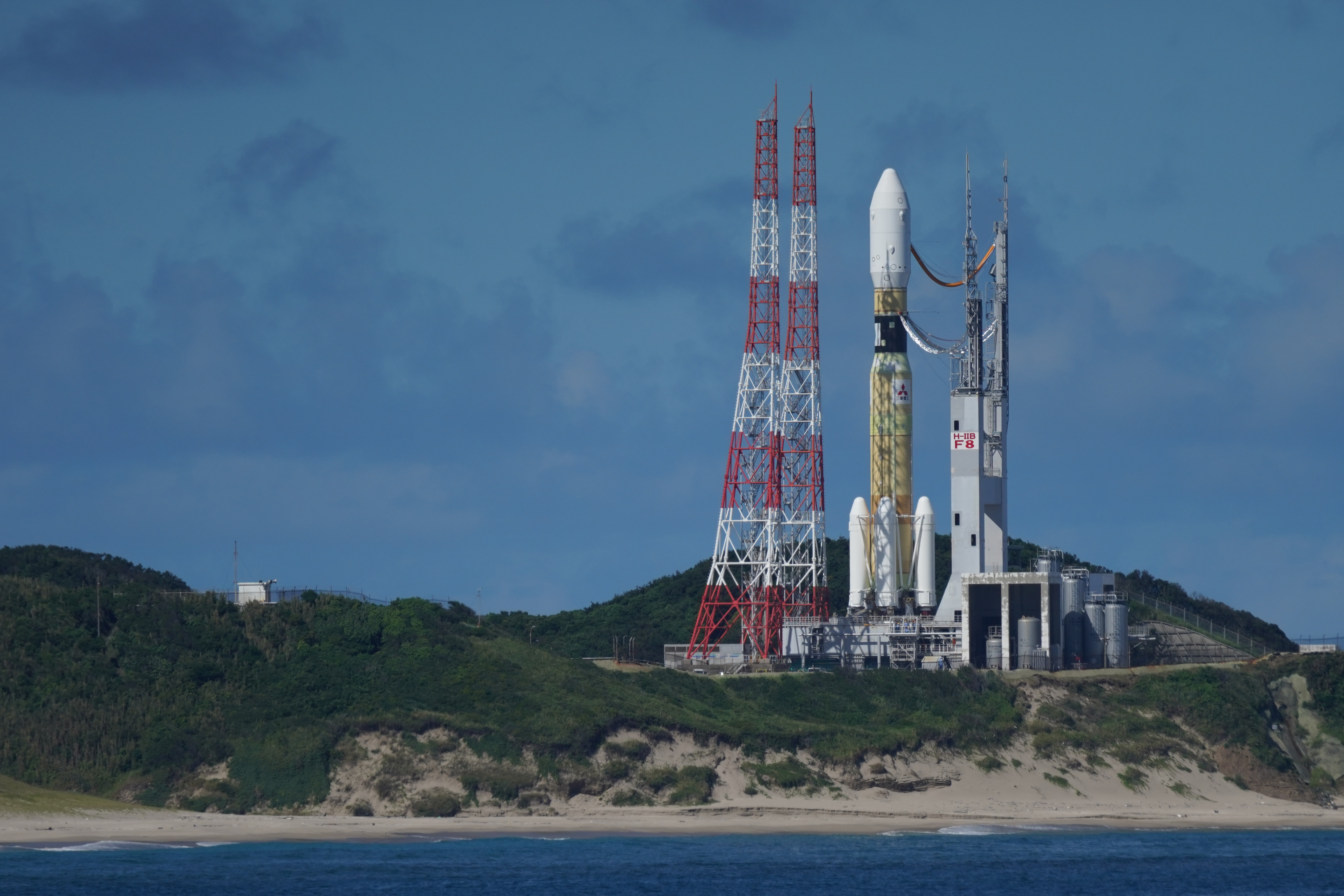 種子島宇宙センター竹崎射場より